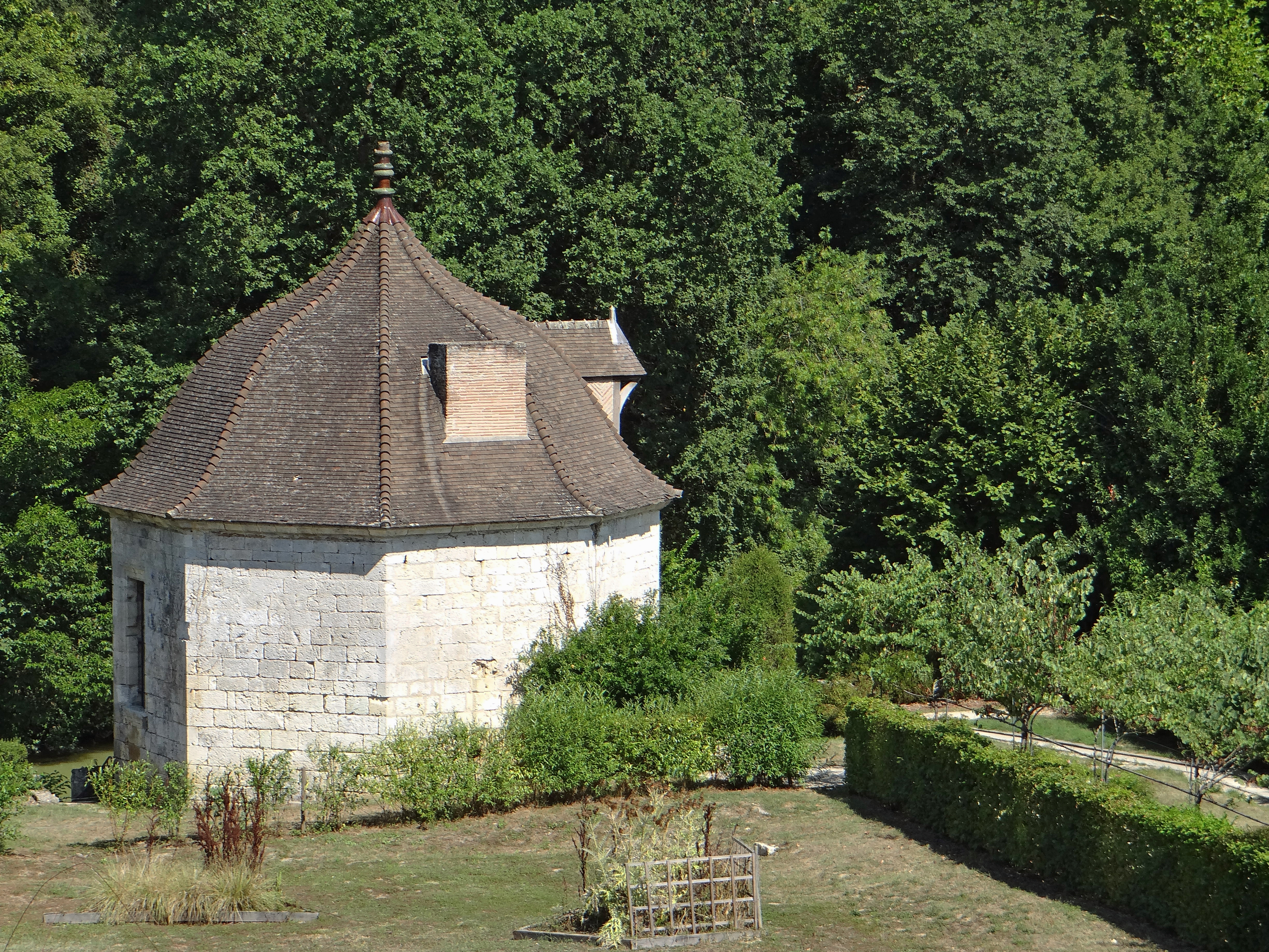 Nérac - Pavillon des Bains du Roi